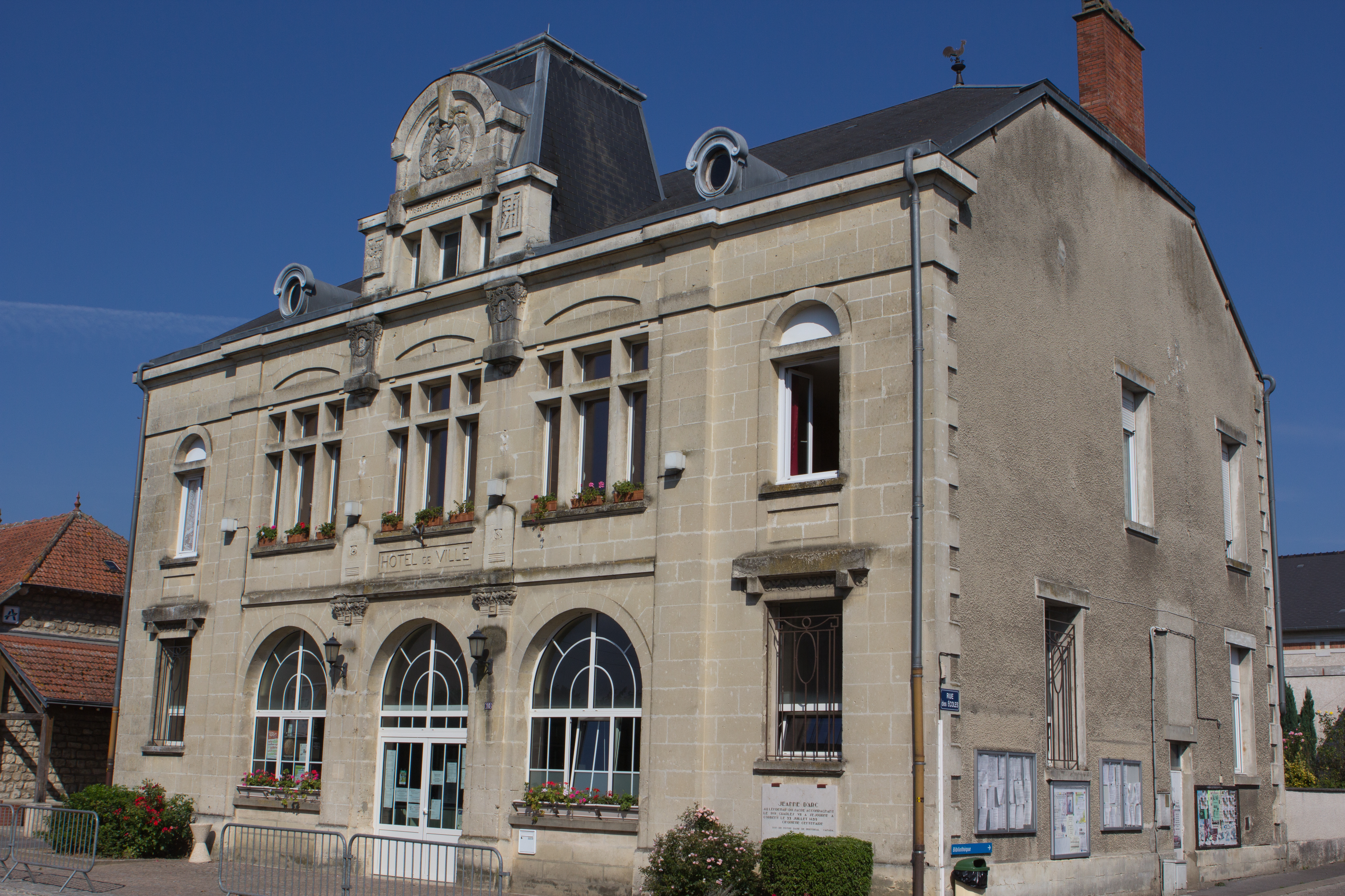 Mairie de Corbeny, Corbeny, Aisne, France